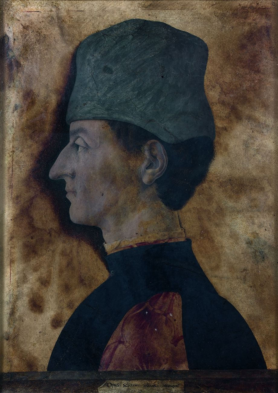 Giorgio Schiavone, Ritratto d’uomo , 1460 ca. Paris, Musée Jacquemart André – Institut de France